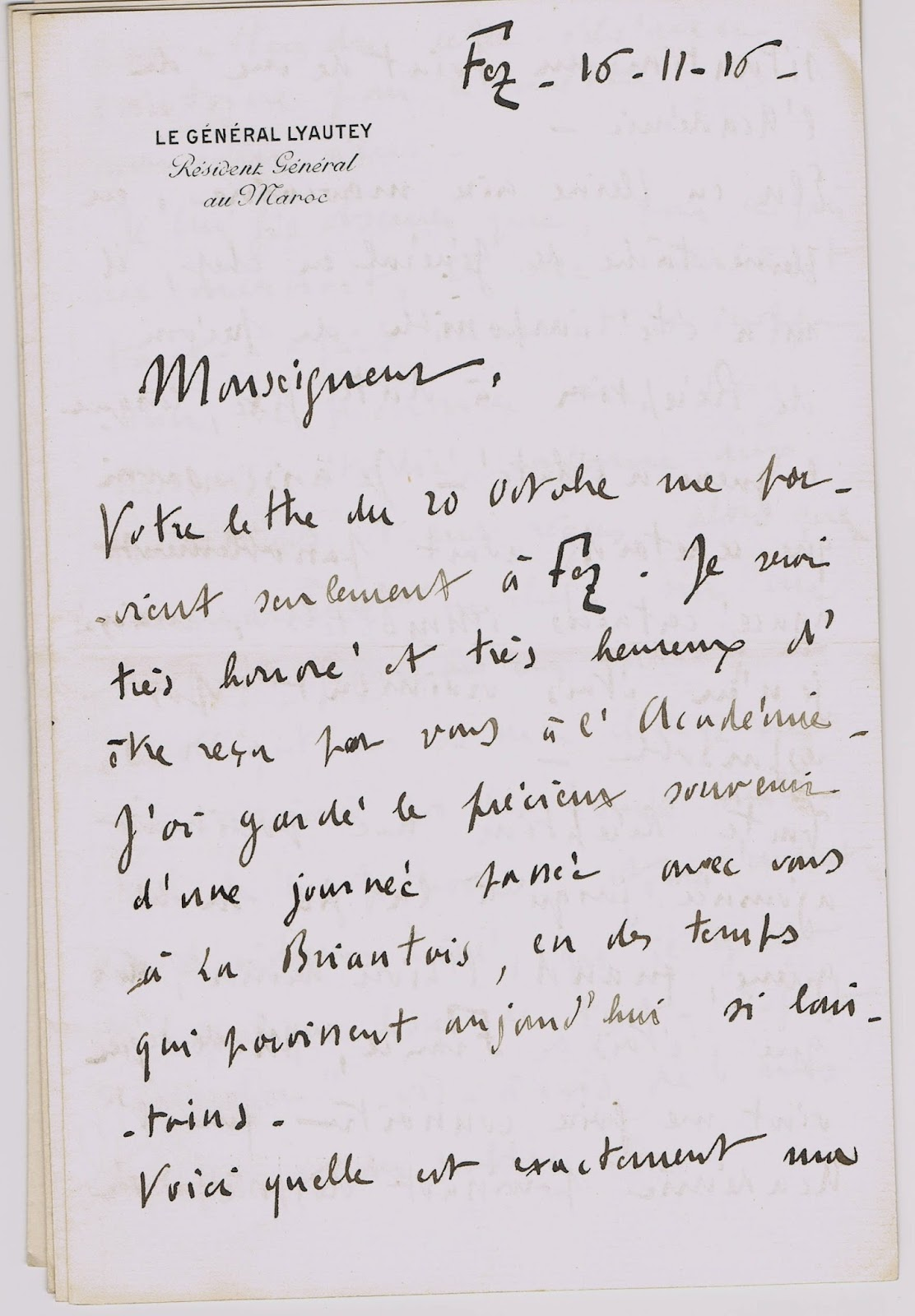 Courrier du maréchal Hubert Lyautey à Louis Duchesne (1843-1922), daté du 16 novembre 1916, collection Marie-Anne Miniac, photographie Jean-François Miniac.